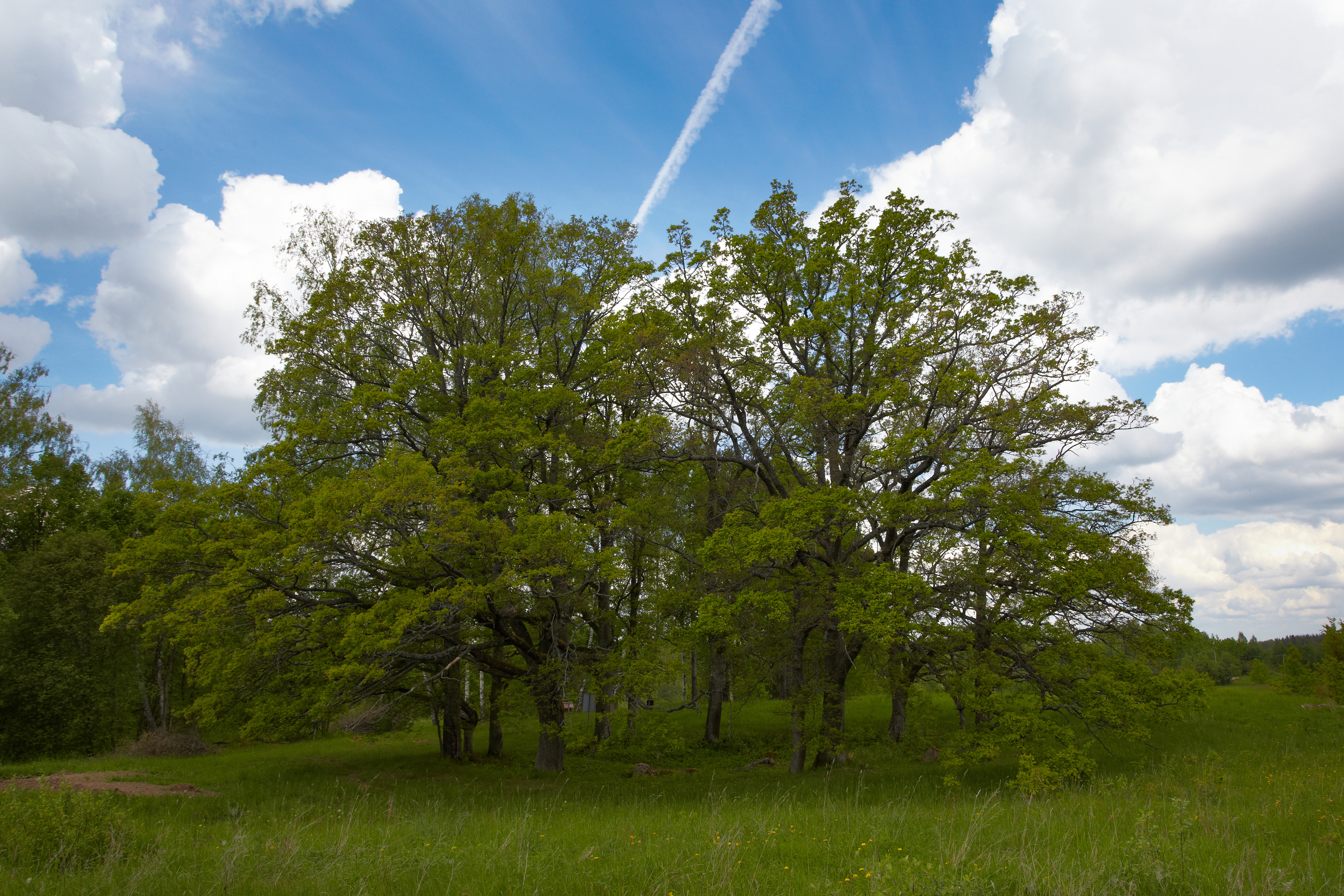 Tammetsõõrina tuntud ohverdamiskoht 2012. aasta maikuus.